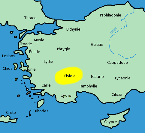 Carte de la Pisidie